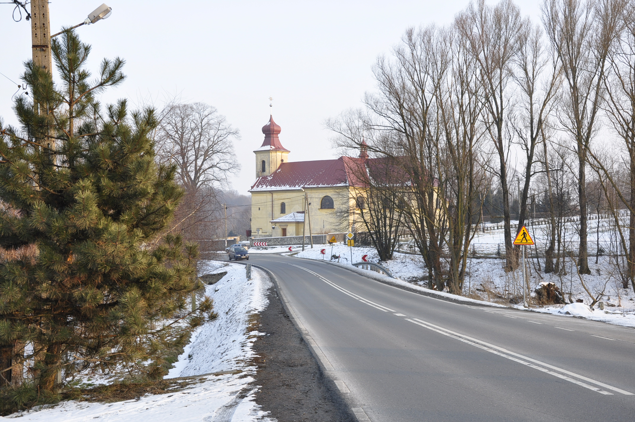 Poręba Żegoty. Kościół pw. św. Marcina z XVIII wieku.